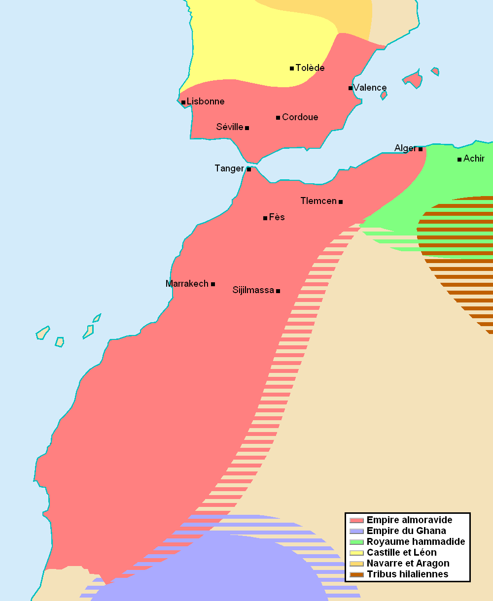 carte de l'Empire Almoravide